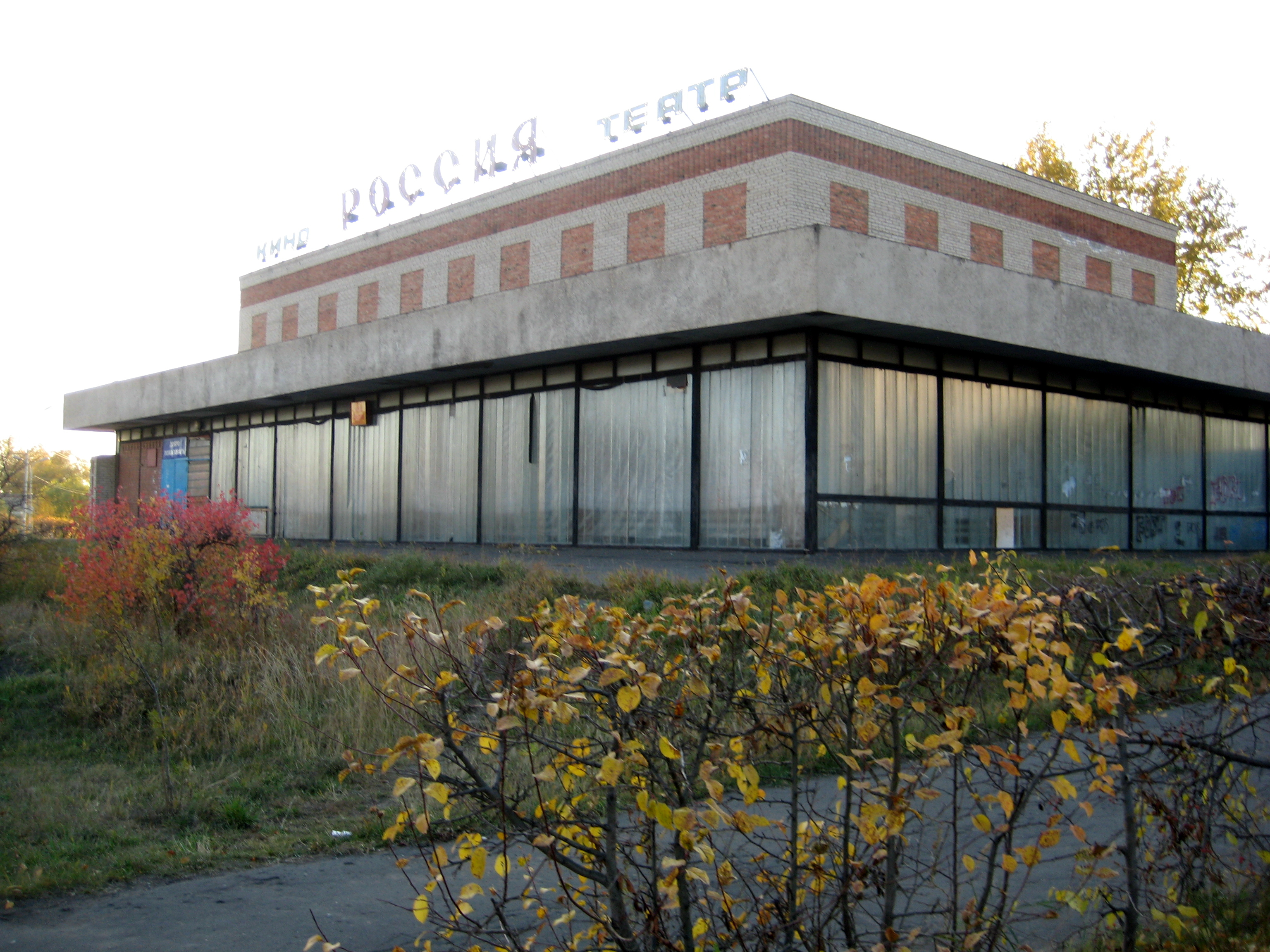 Кинотеатр "Россия", п.г.т. Любино, Омская область, Россия